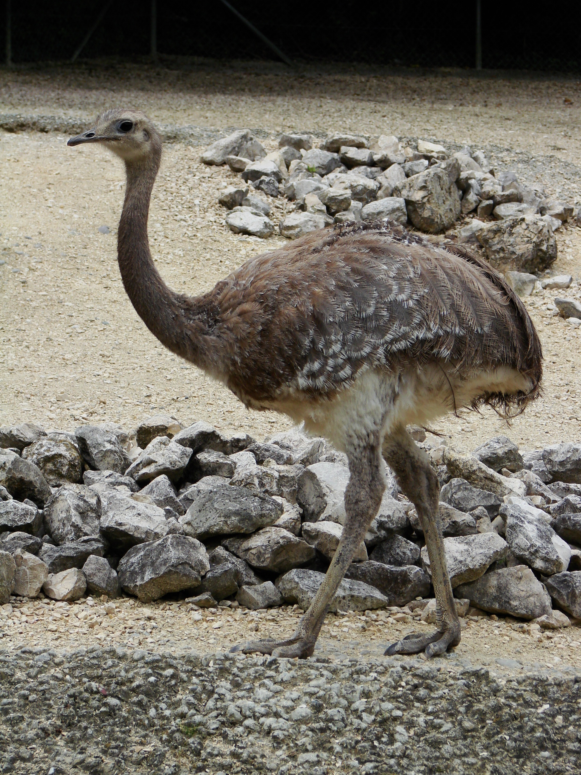 Nandou de Darwin (Pterocnemia pennata)